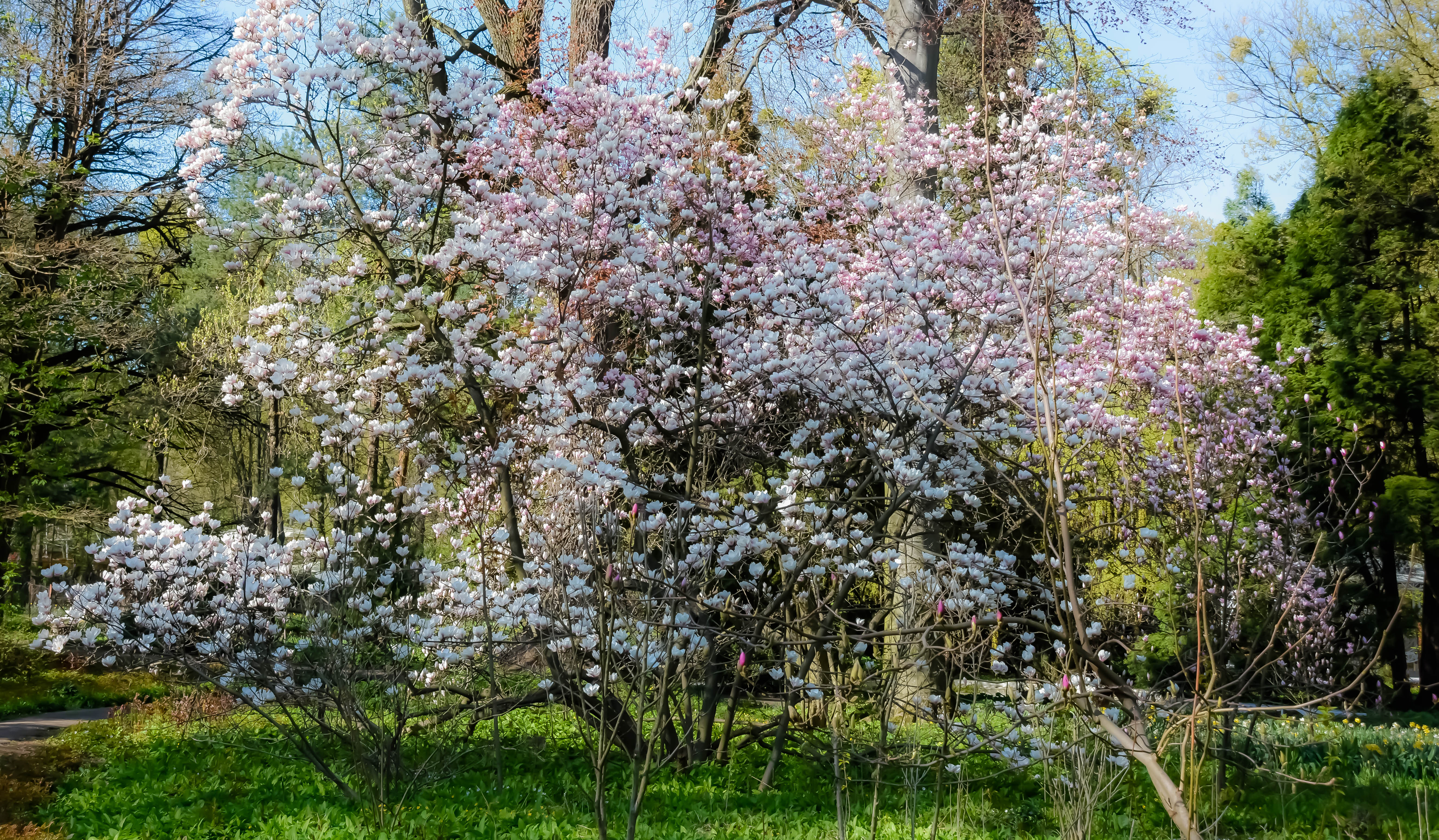 Чернівецький, м. Чернівці, вул. Федьковича, 11